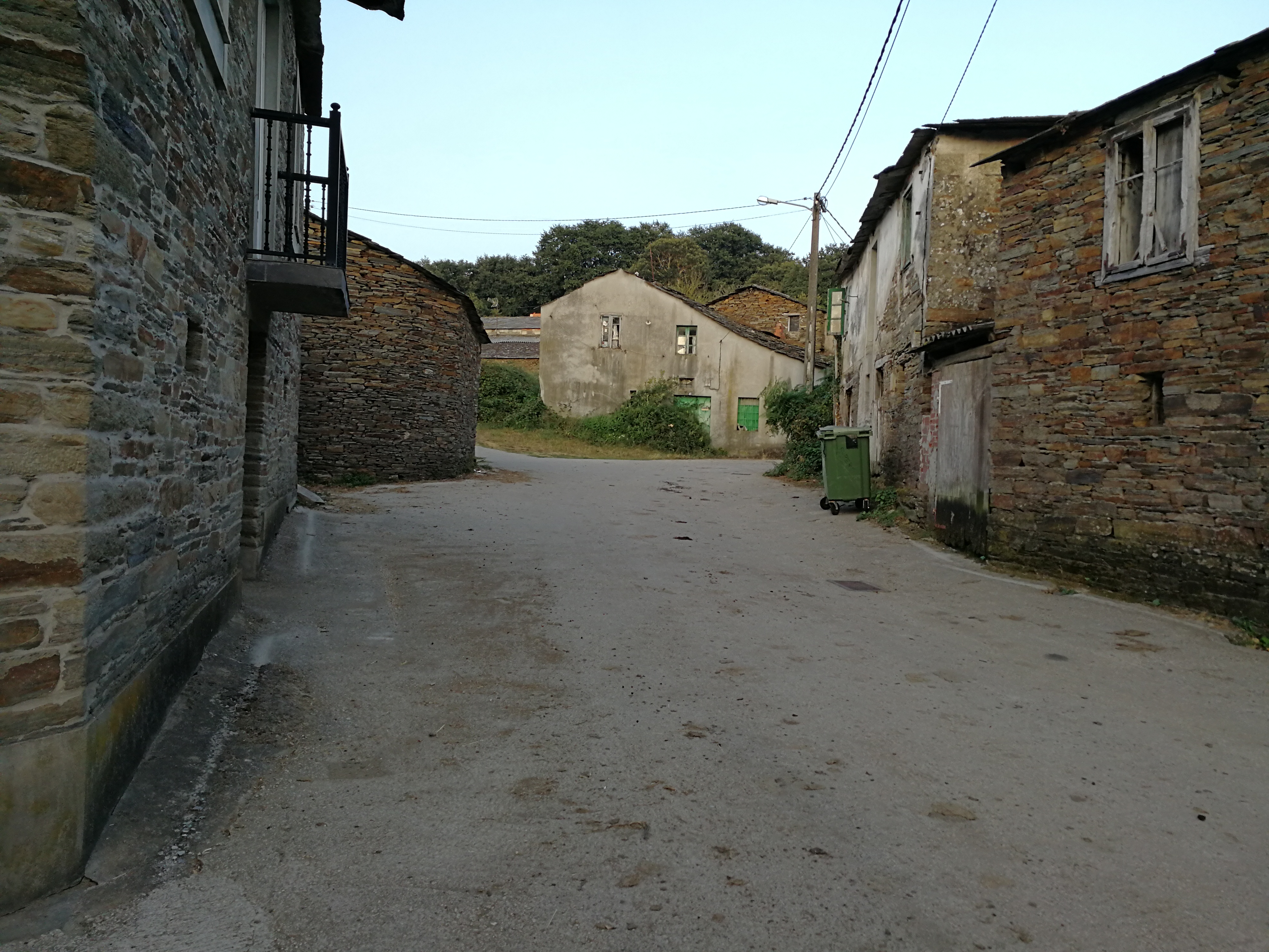 Aldea de Aián, Parroquia de Santo Estevo de Reiriz, concello de Samos, Lugo.